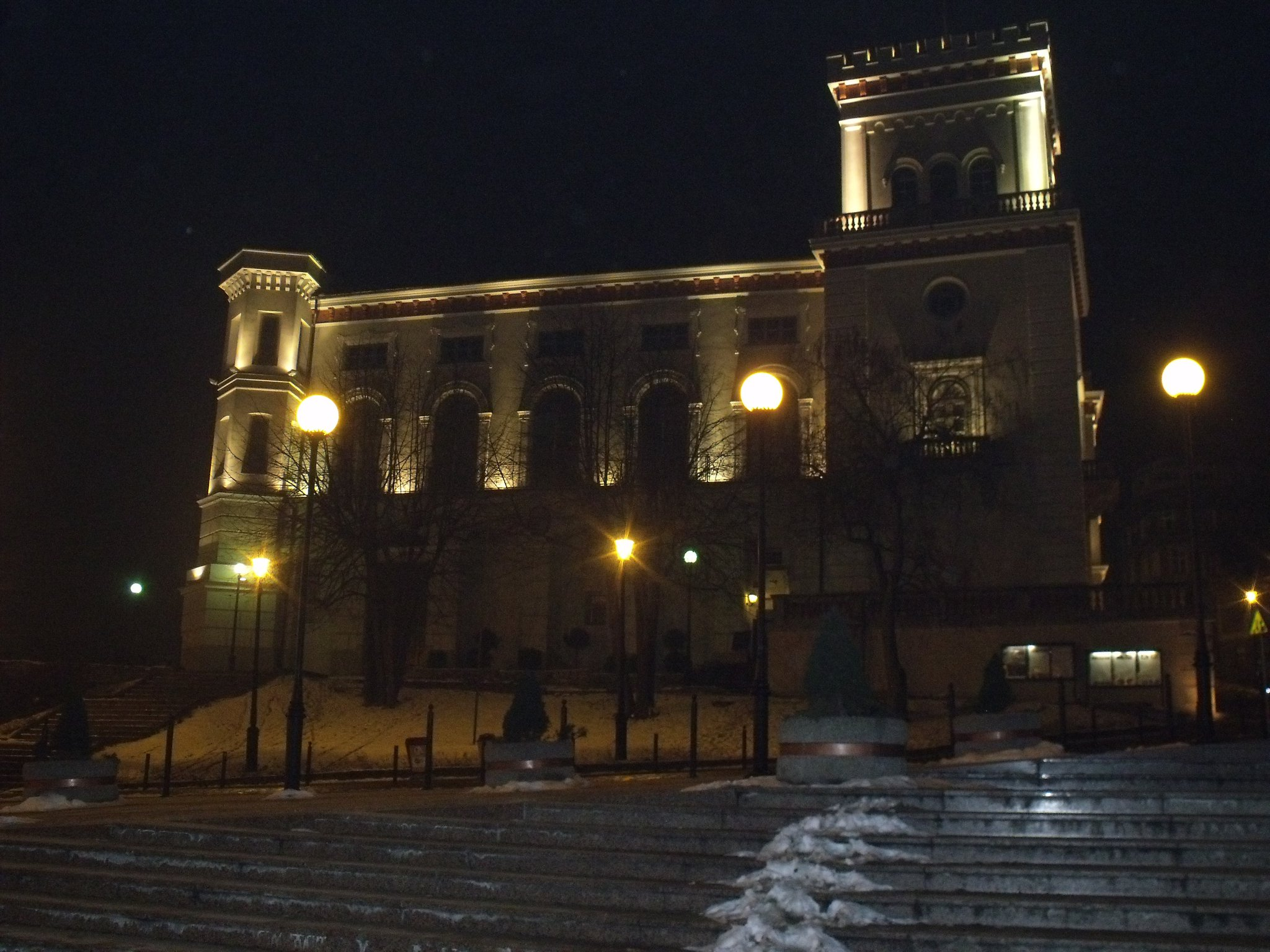 Alberga o museo da cidade de Bielsko-Biała